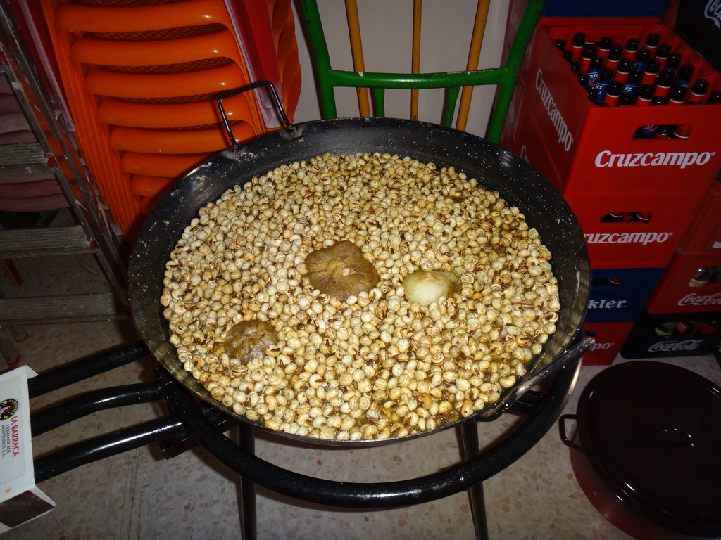 Caracoles con especias "a la Andaluza" (Jerez Fra., España)